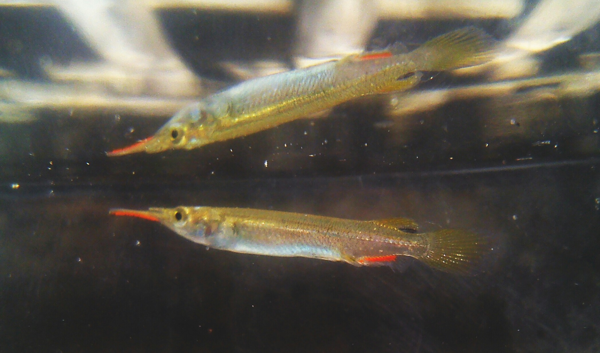 Dermogenys pusilla, from Seputih Raman, Lampung, Indonesia.